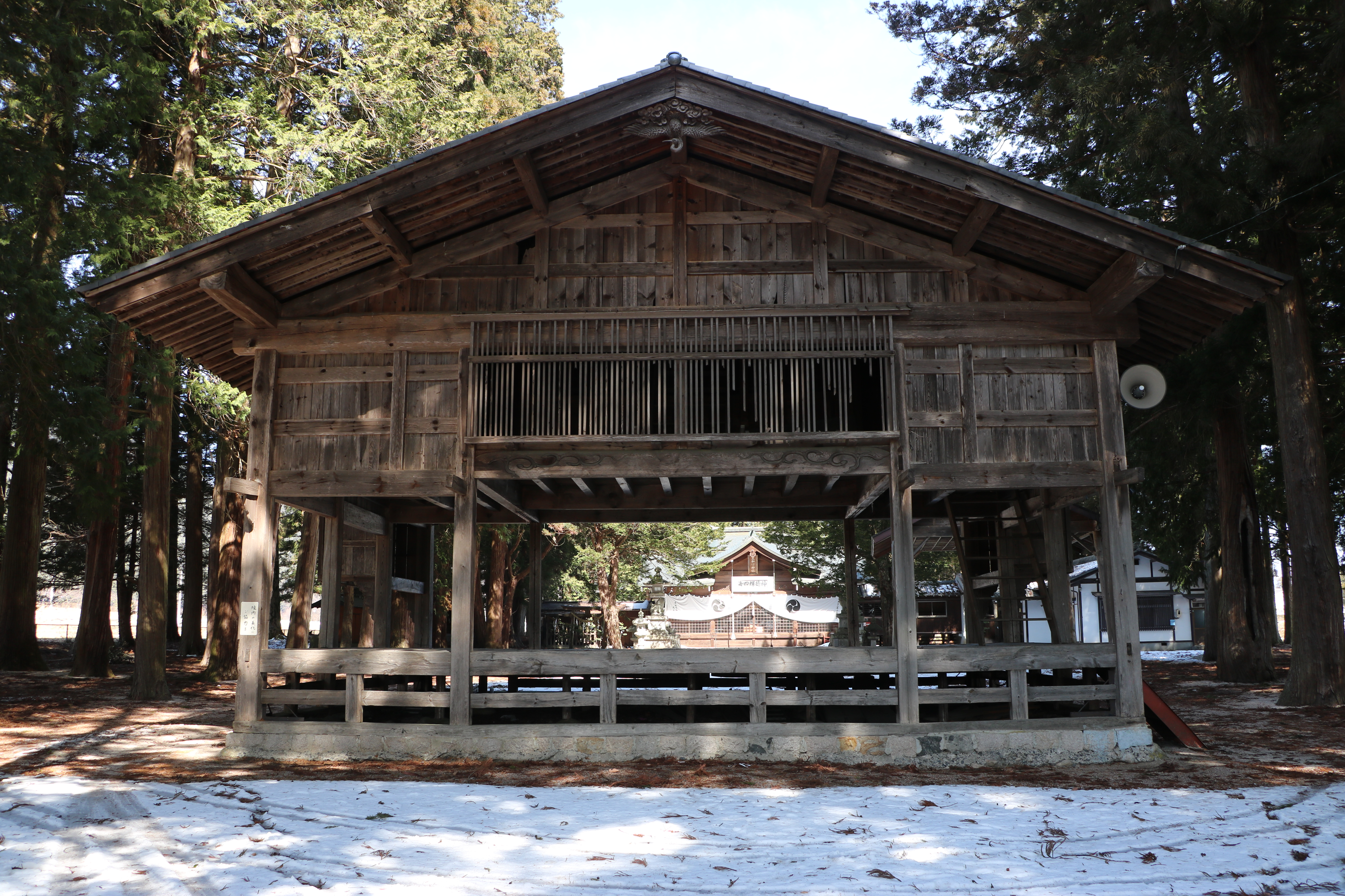 大和田神社神楽殿（長野県松川村）